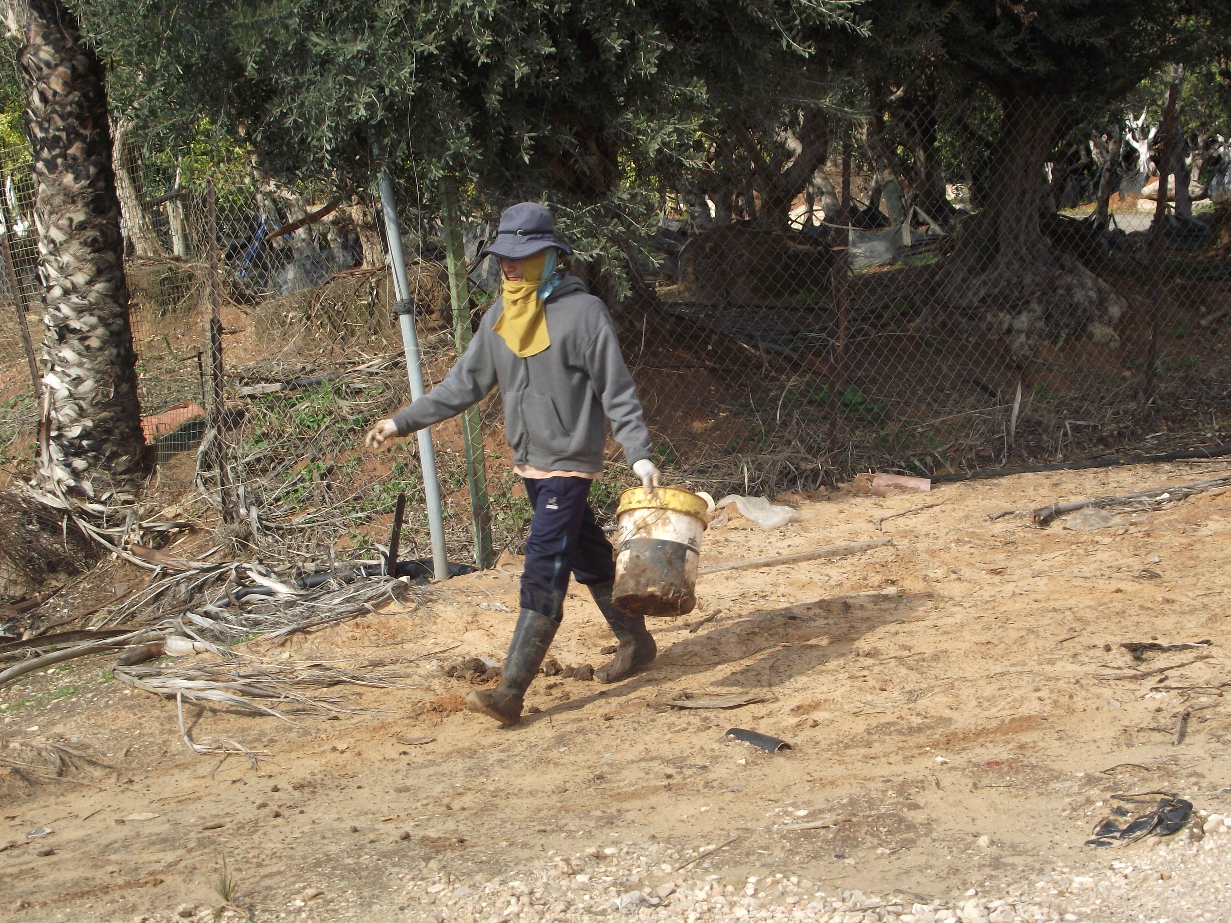 מהגר עבודה רמת השרון